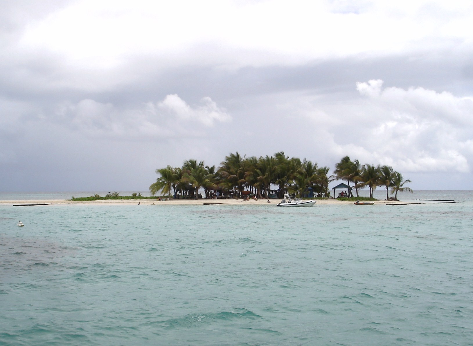 Ilet Caret, se situant au large de Sainte-Rose en Guadeloupe.